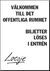 Svensk Loesje-affisch. Använd med tillstånd.